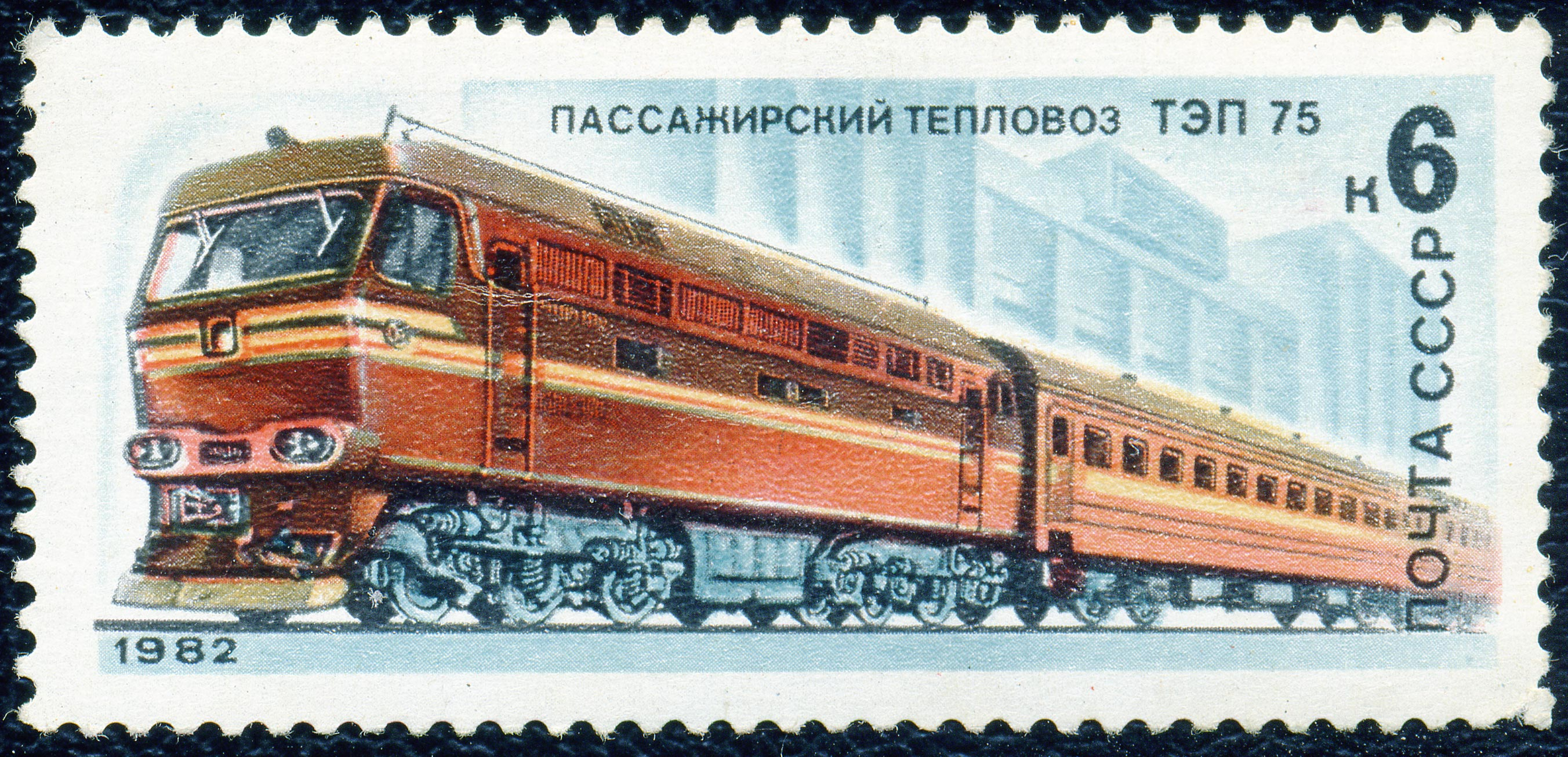 Почтовая марка СССР. 1982. ТЭП 75